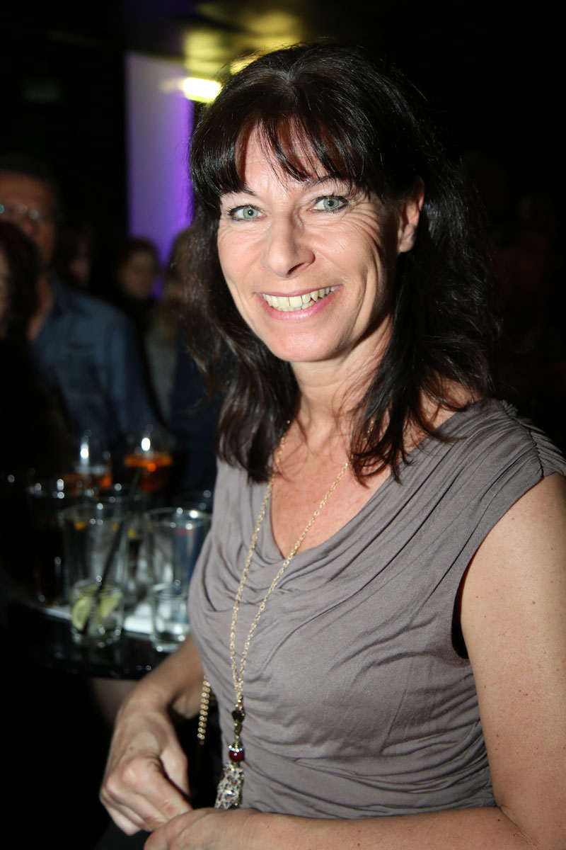 Kristofics-Binder.Claudia-5789